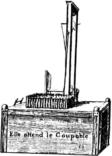 Dessin d'une guillotine avec inscription "Elle attend le coupable"